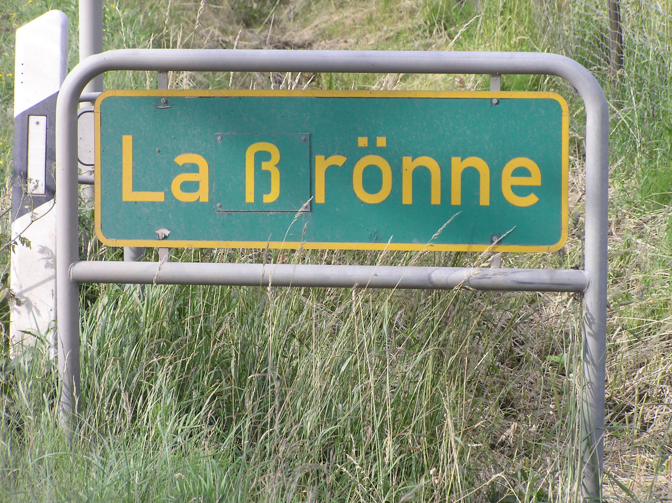 Ortsschild Laßrönne, Ortsteil der Gemeinde Winsen (Luhe) im Landkreis Harburg in Niedersachsen.